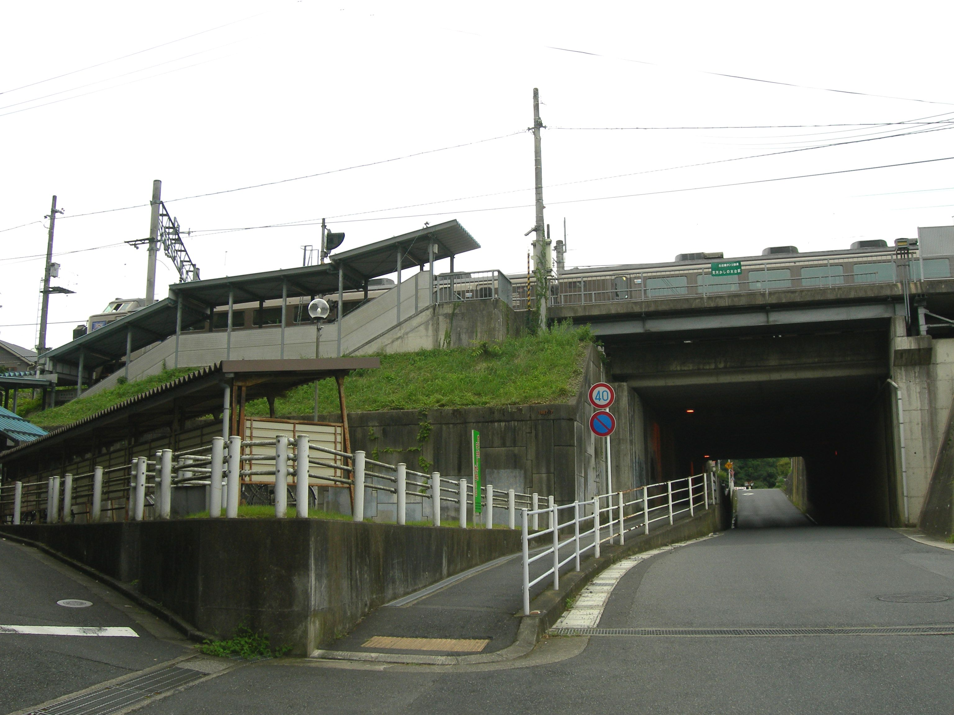 荒河かしの木台駅